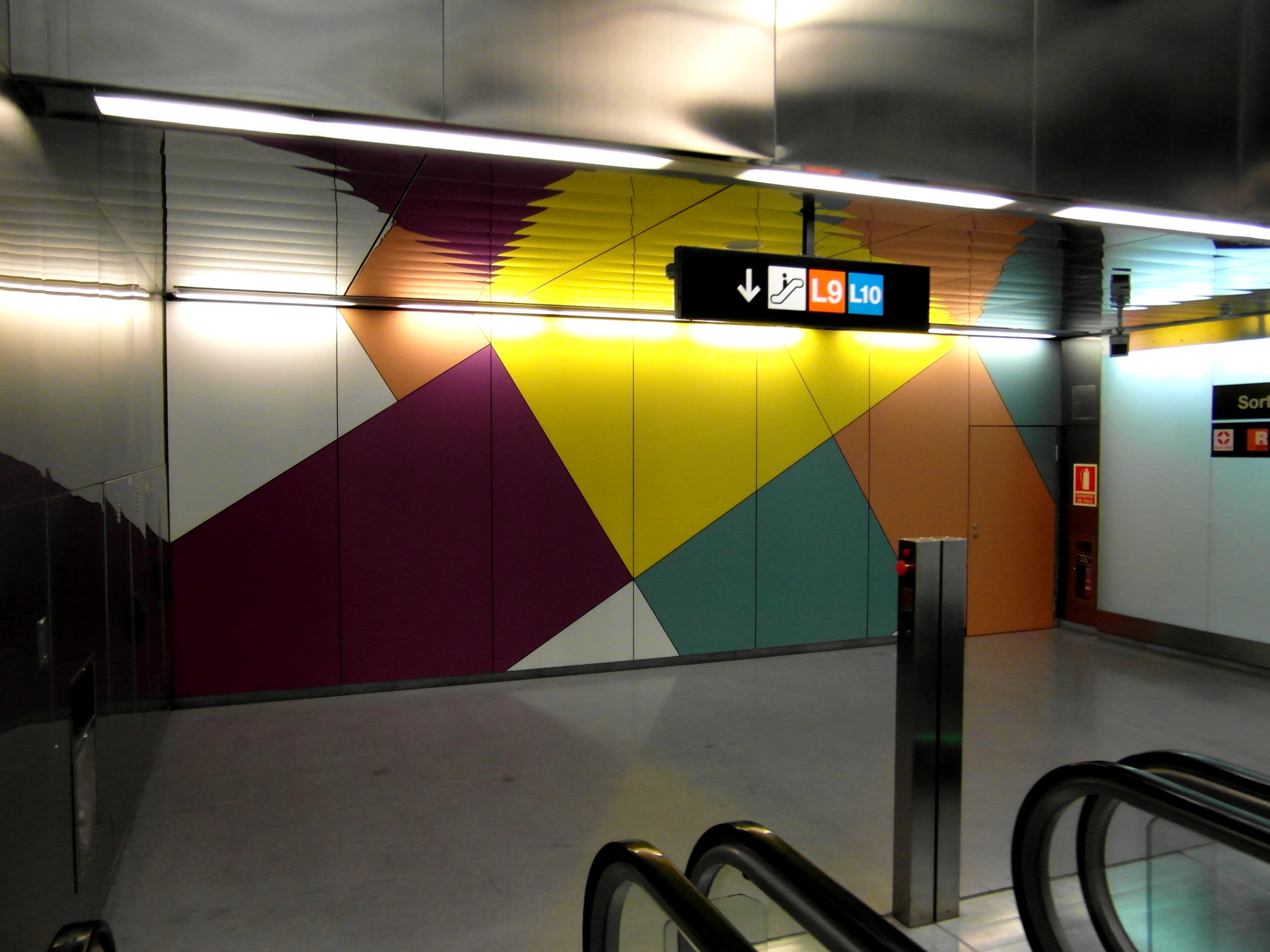 Barcelona - Estació de la Sagrera